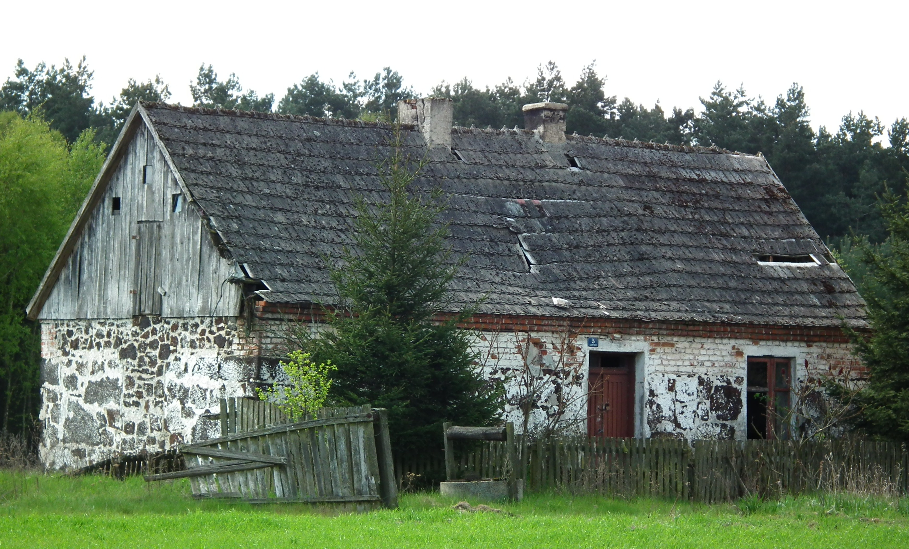 Gospodarstwo olęderskie z rudy darniowej - Czarnybród 5 w gm. Grodziec.